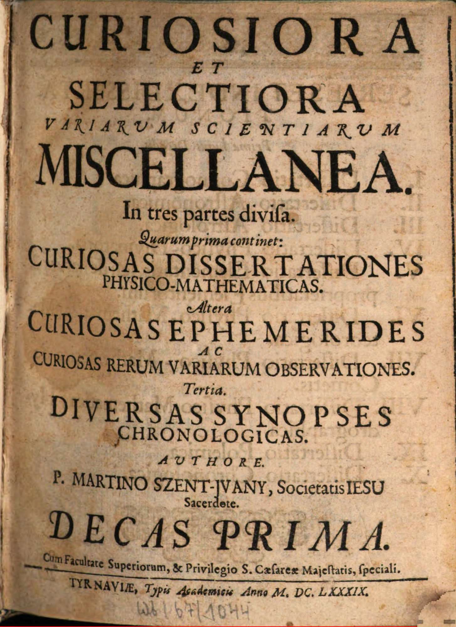 Martin Szentiványi: Curiosiora et selectiora variarum scientiarum miscellania, erster Teil, Tyrnau 1689, Titelseite